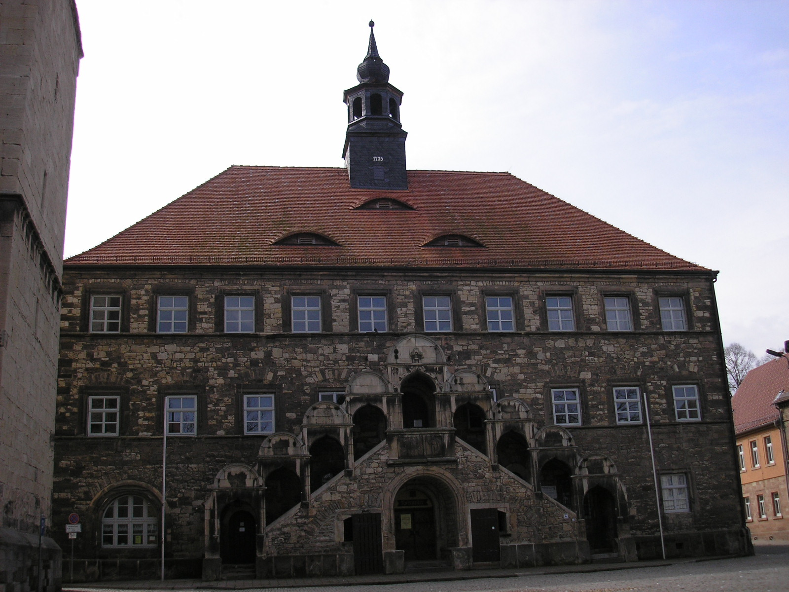 Das Rathaus in Laucha (Sachsen-Anhalt)